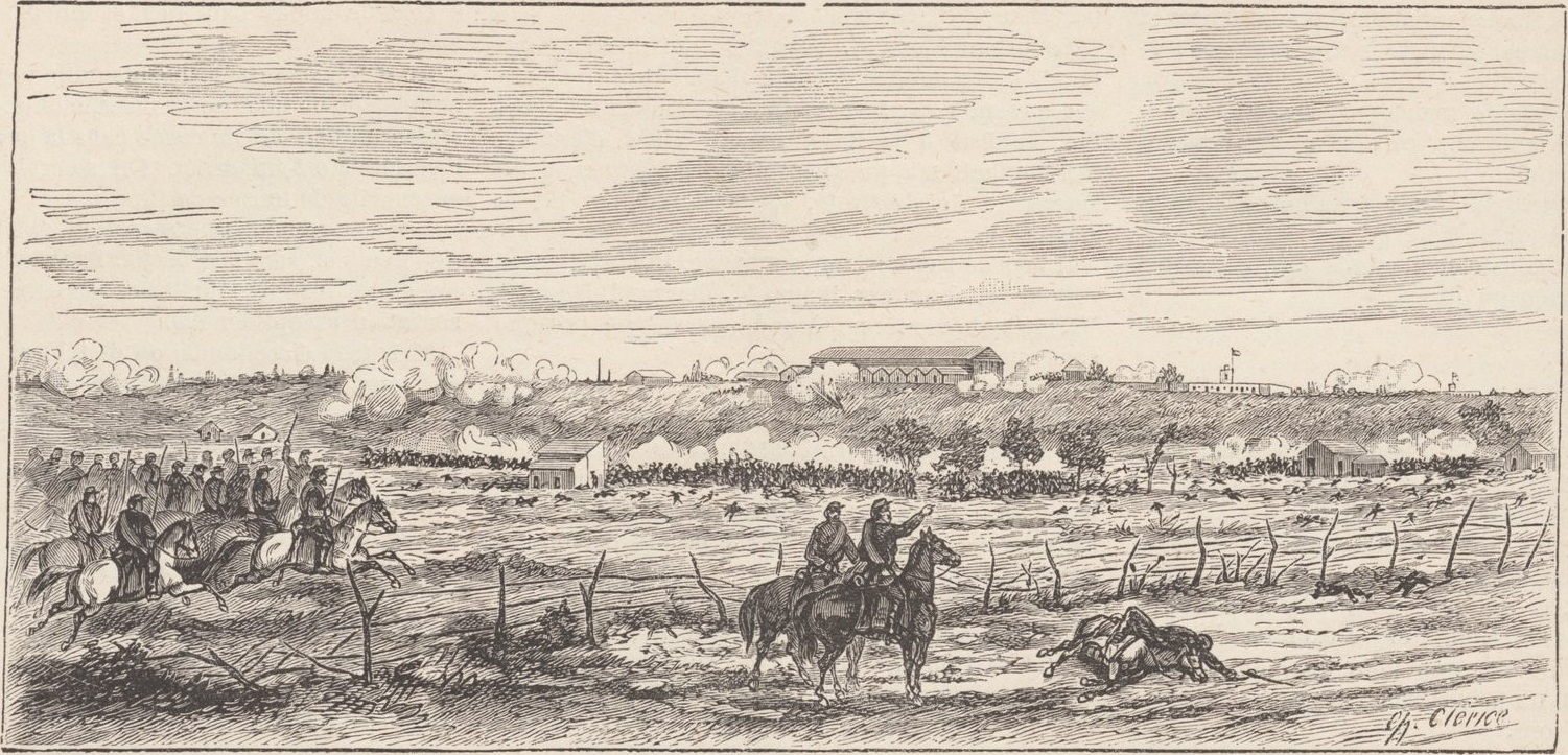 Bataille du 21juin. — Attaque, par les troupes nationales, des hauteurs des Corrales (abattoirs), défendues par la garde nationale de Buénos-Ayres.